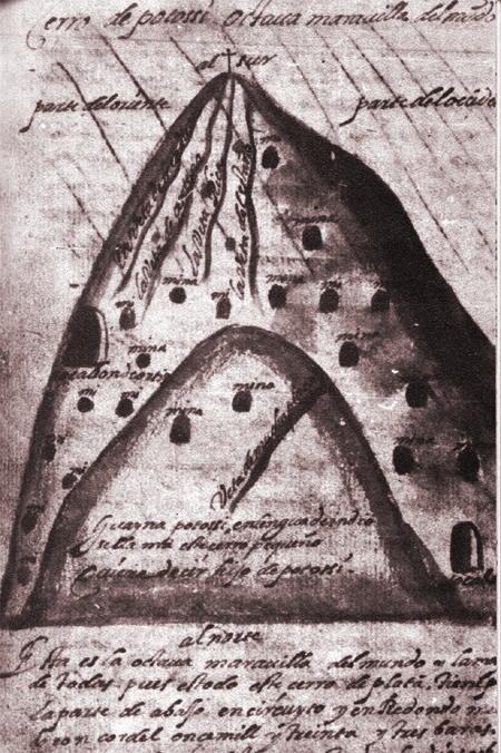 Publicada en el libro "Un viaje fascinante por la América Hispana del siglo XVI" de Fray Diego de Ocaña